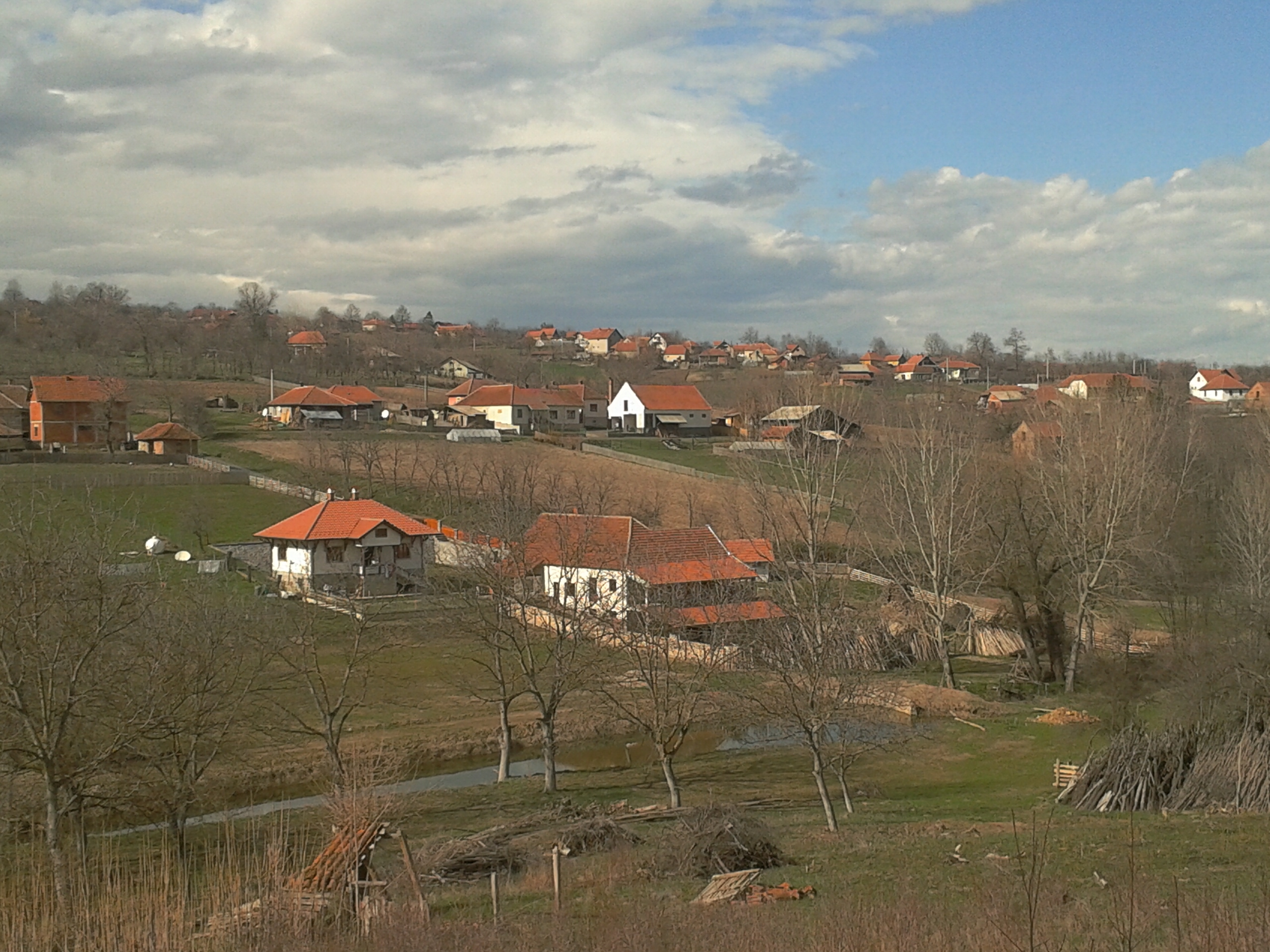 један од пејзажа Мирашевца